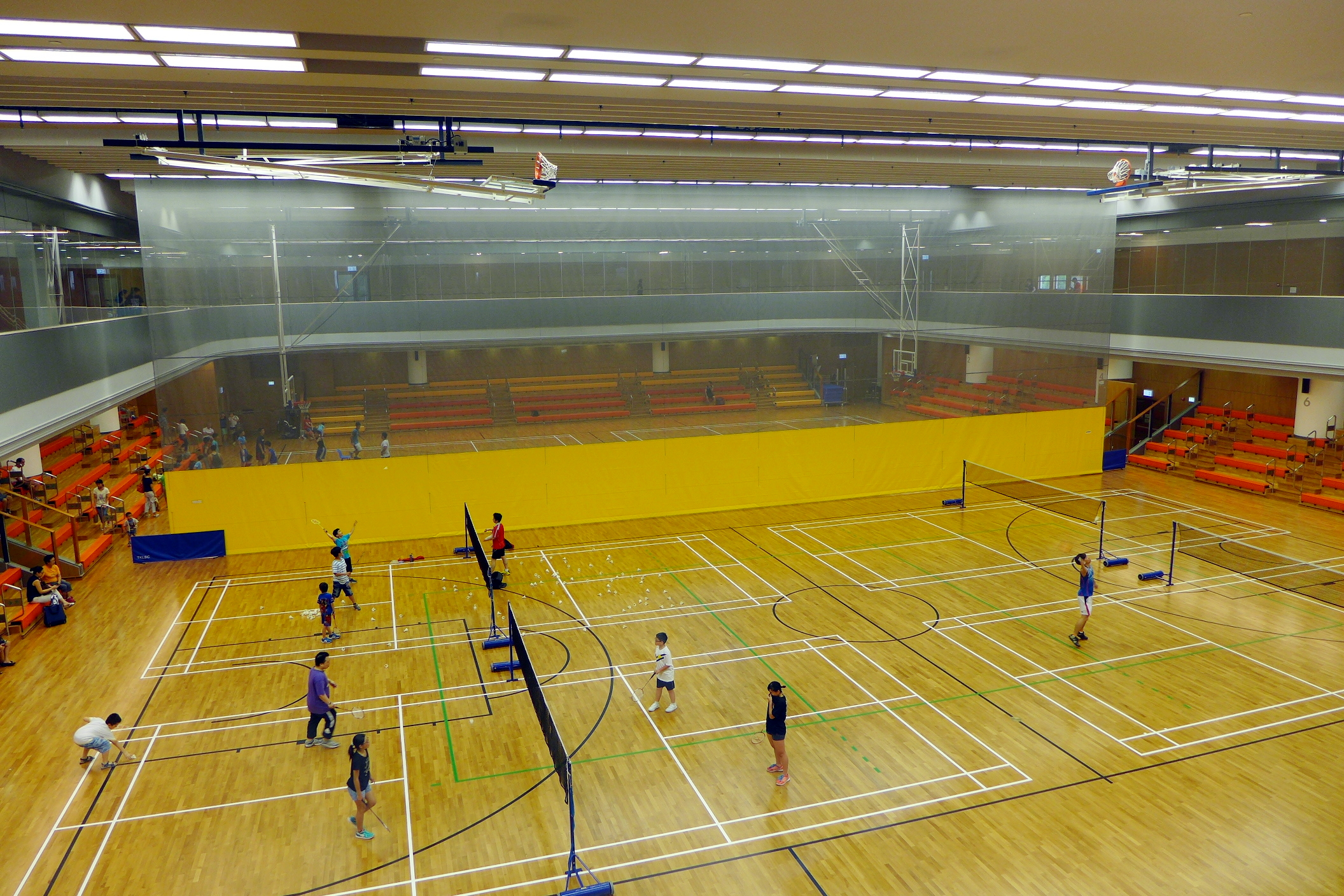 Tiu Keng Leng Sports Centre Arena